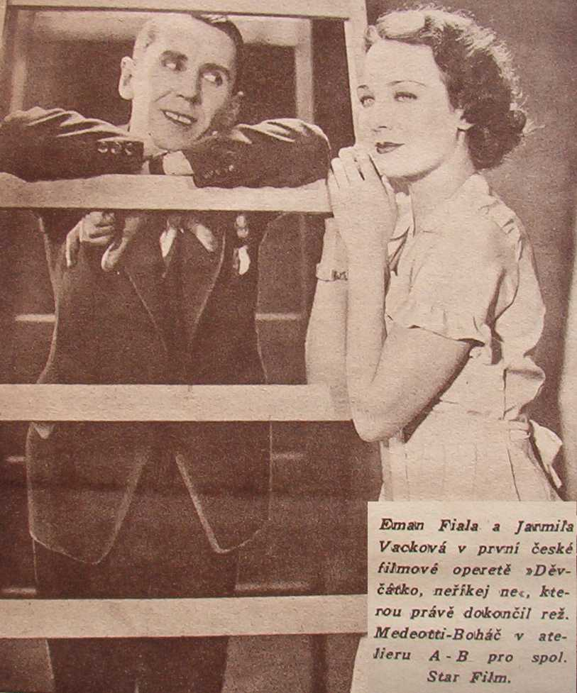 Eman Fiala (1899-1970), český herec, režisér, hudební skladatel a hudebník.